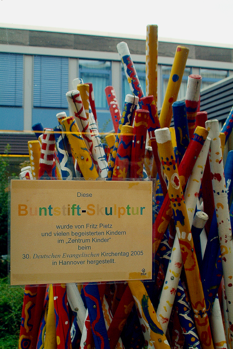 Auf das Fenster geklebtes Hinweisblatt zu den von dem Künstler Fritz Pietz "... und vielen begeisterten Kindern im Zentrum Kinder ..." 2005 während des 30. Deutschen Evangelischen Kirchentages hergestellte Skulptur aus "Riesenbleistiften" ...